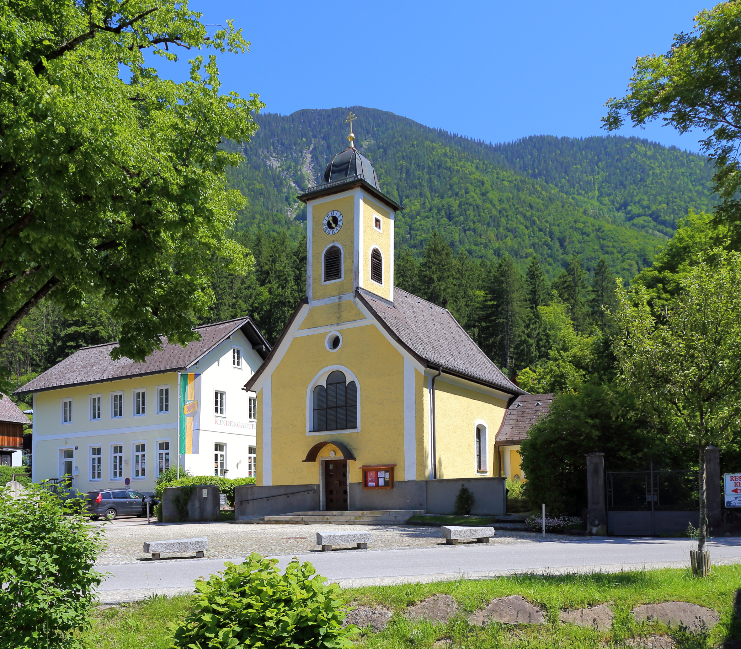 Südsüdwestansicht der 1771 errichteten katholischen Kirche Hl. Dreifaltigkeit in der oberösterreichischen Gemeinde Obertraun.